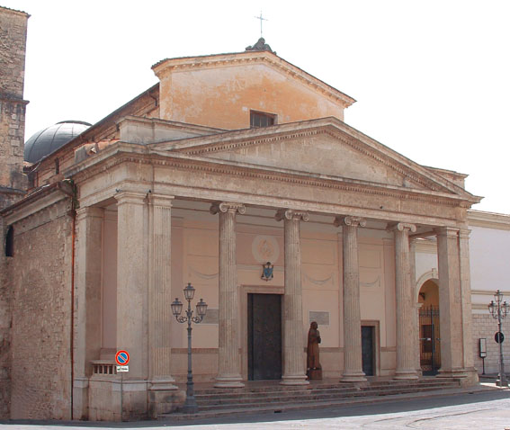 Cattedrale di S. Pietro Apostolo a Isernia - Italy